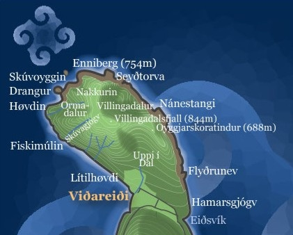 Nordlige del af øen Viðoy med Viðareiði og Kap Enniberg